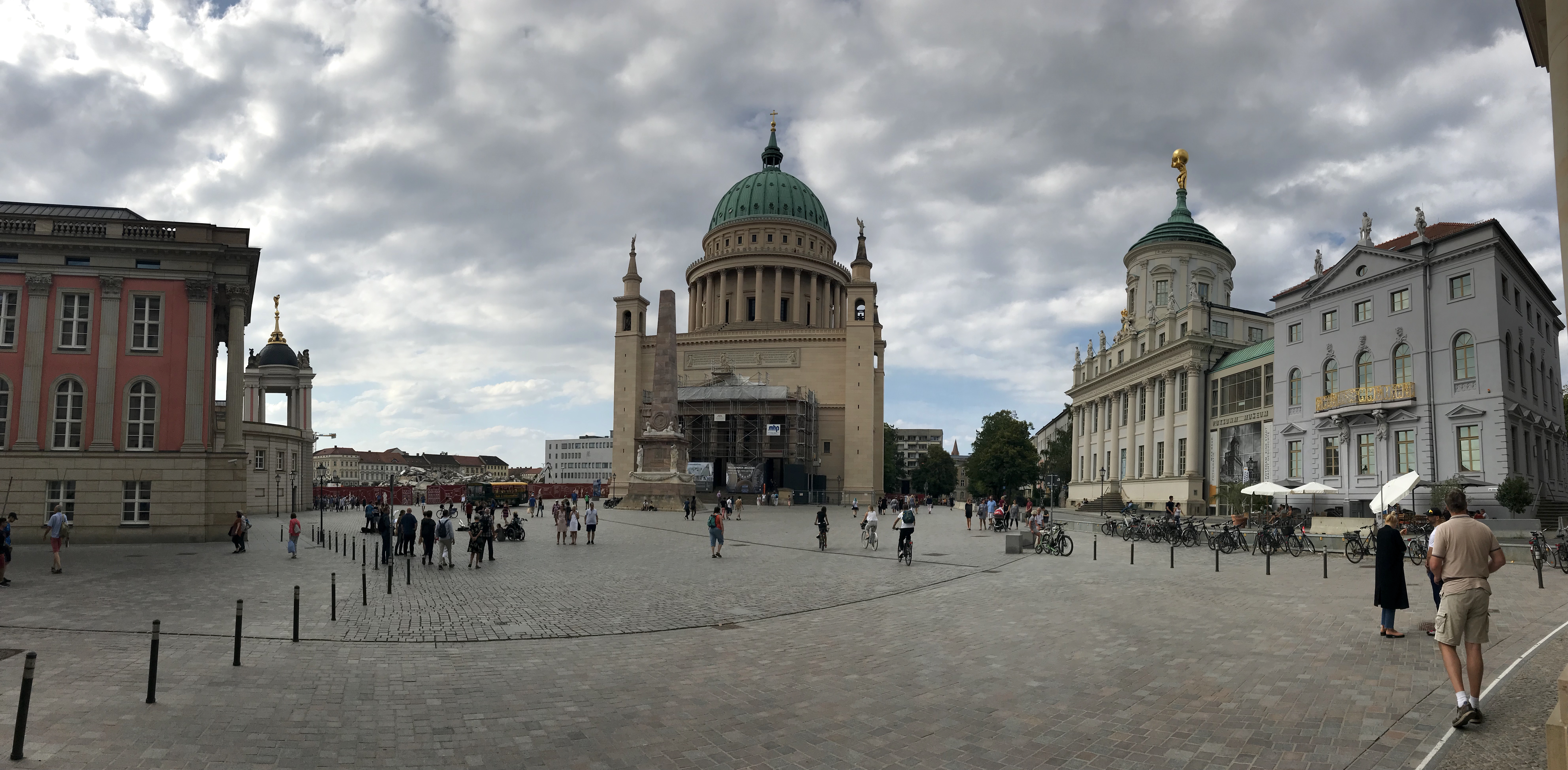 Alter Markt (Potsdam) im August 2018, Nordseite